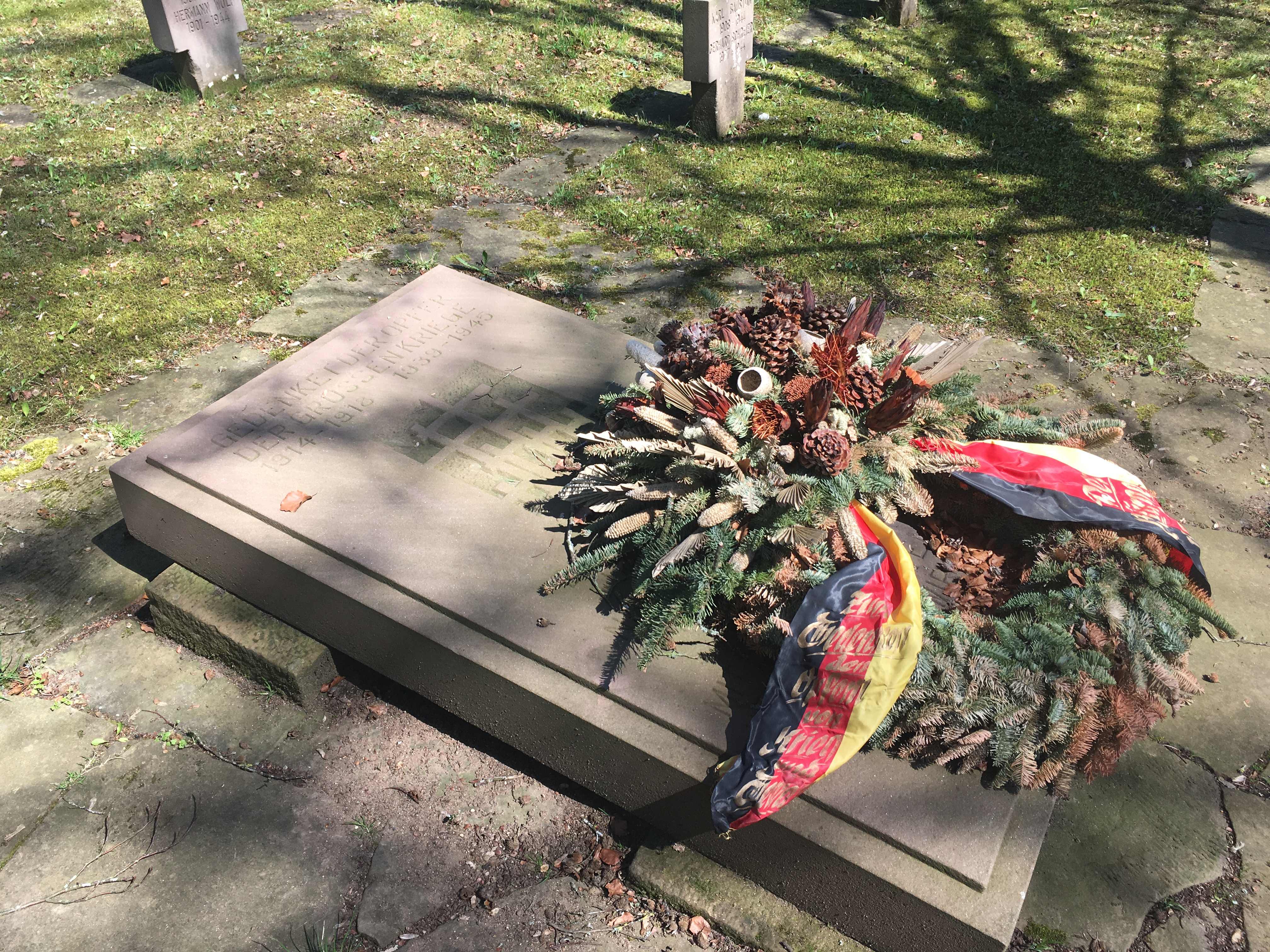 Die Kriegsgräberstätte Blankenheim–Alendorf befindet sich in Alendorf, einem Ortsteil der Gemeinde Blankenheim (Ahr) im Kreis Euskirchen in Nordrhein-Westfalen.